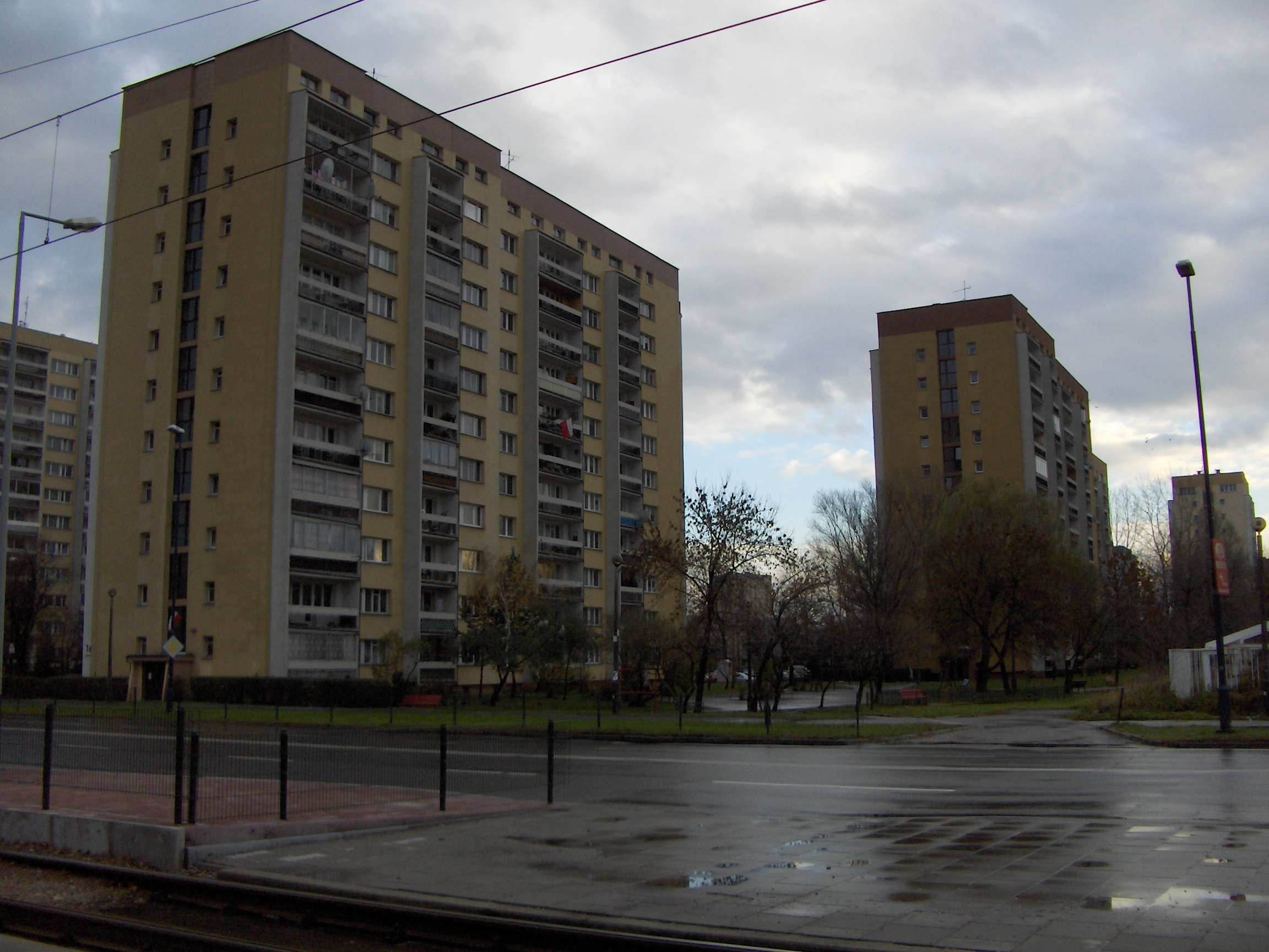 Bloki mieszkaniowe na Osiedlu Cegielniana ( widok na stronę północną ) Kraków , Dzielnica IX.